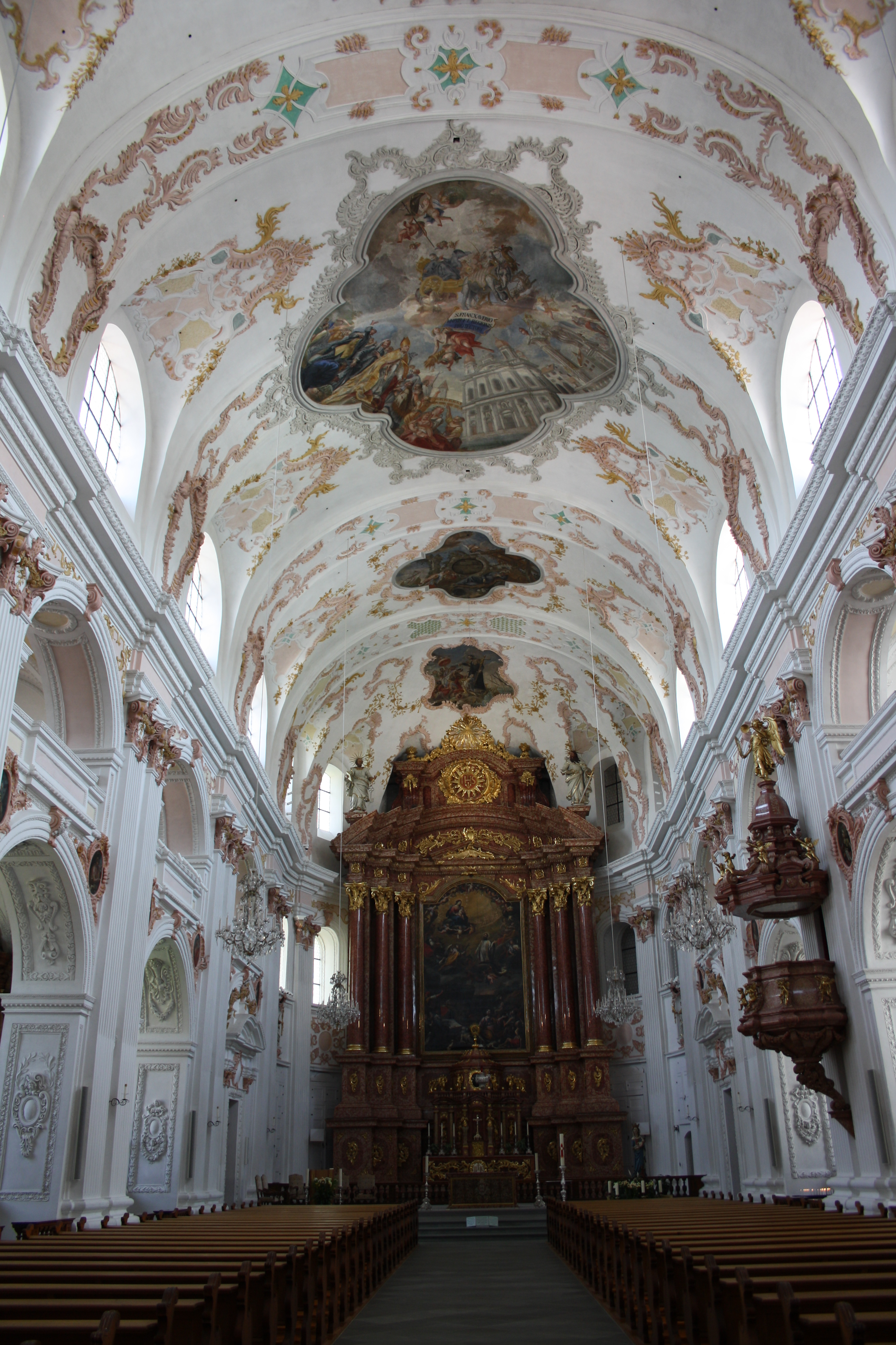 Jesuitenkirche Luzern, das Innere (Mai 2019)